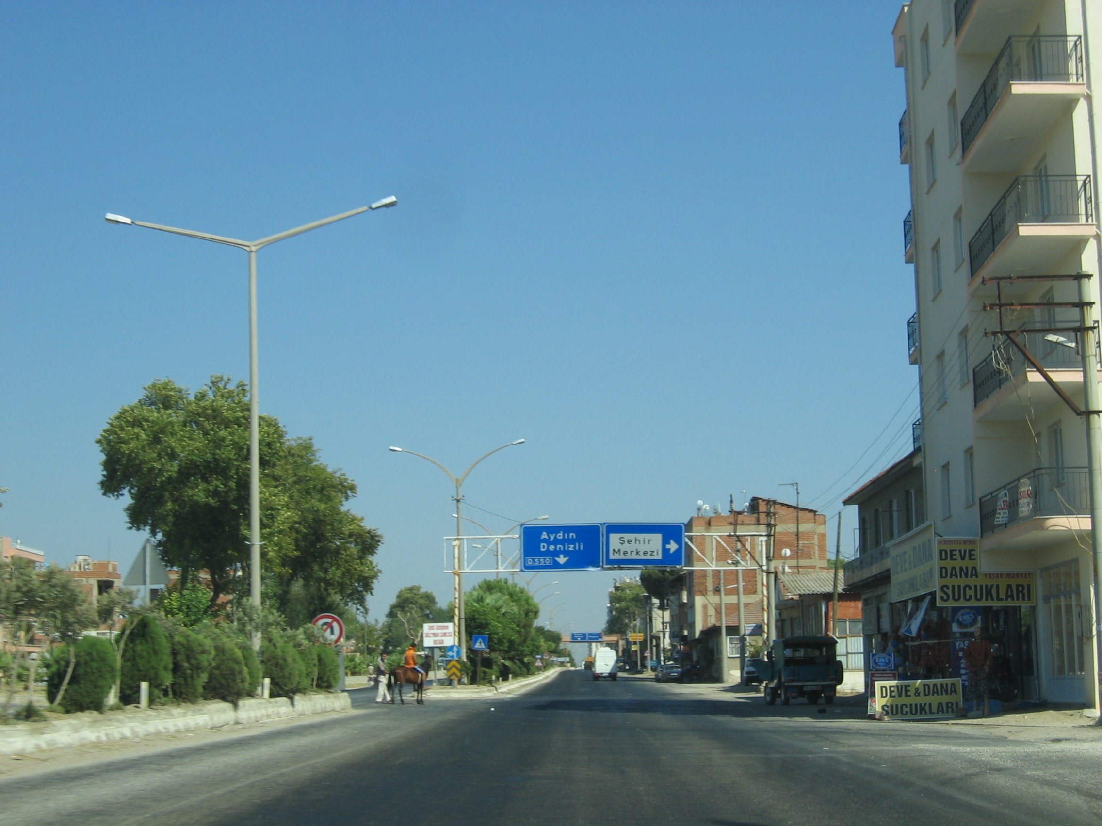 Incirliova - Deve & Dana sucuklari :)